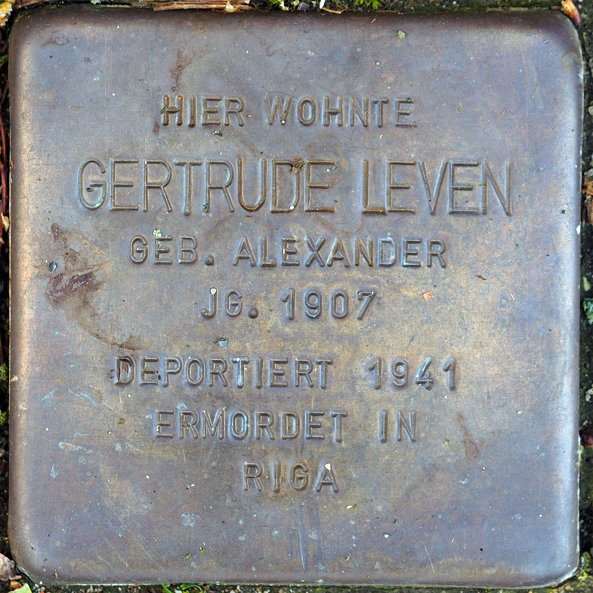 Stolpersteine MG: Leven, Gertrude